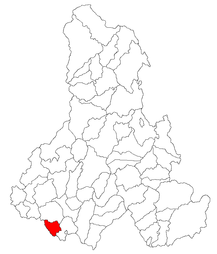 Categorie:Hărţi ale judeţului Harghita Contents 1 Licensing 2 Sursă 3 Licensing 4 Original upload log Licensing Sursă ro::Imagine:Harta_jud_Harghita.png